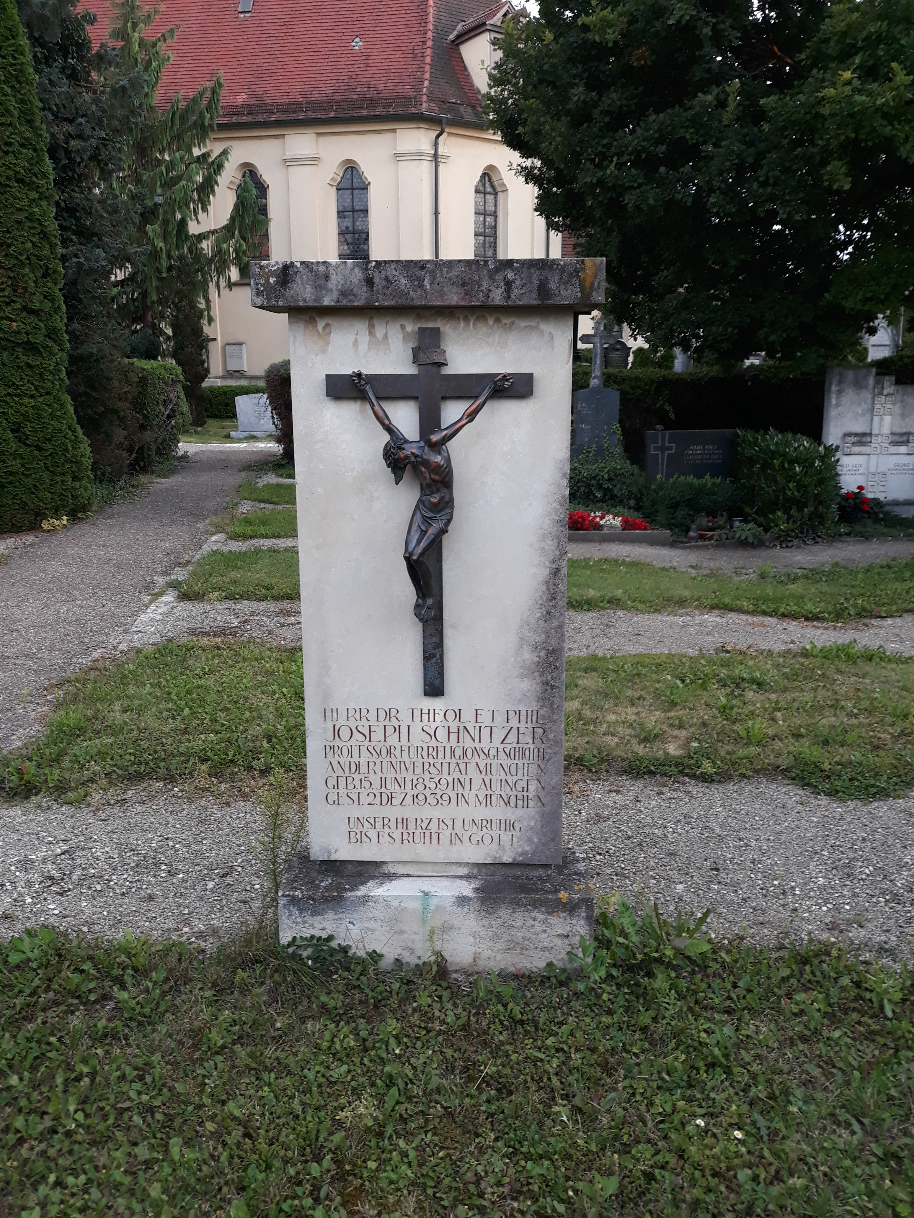 Das Grab des deutschen katholischen Theologen und Kirchenhistorikers Joseph Schnitzer auf dem Friedhof von Lauingen (Donau).